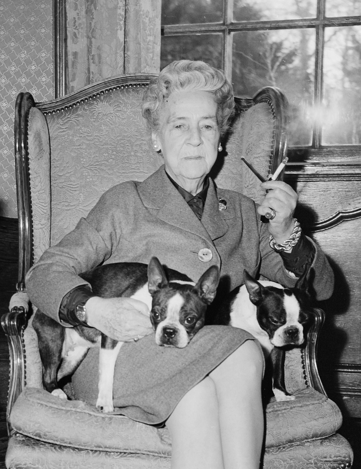 Prinses Armgard, de moeder van prins Bernhard, zittend met twee honden op schoot terwijl zij een sigaret rookt, naar aanleiding van haar 82ste verjaardag